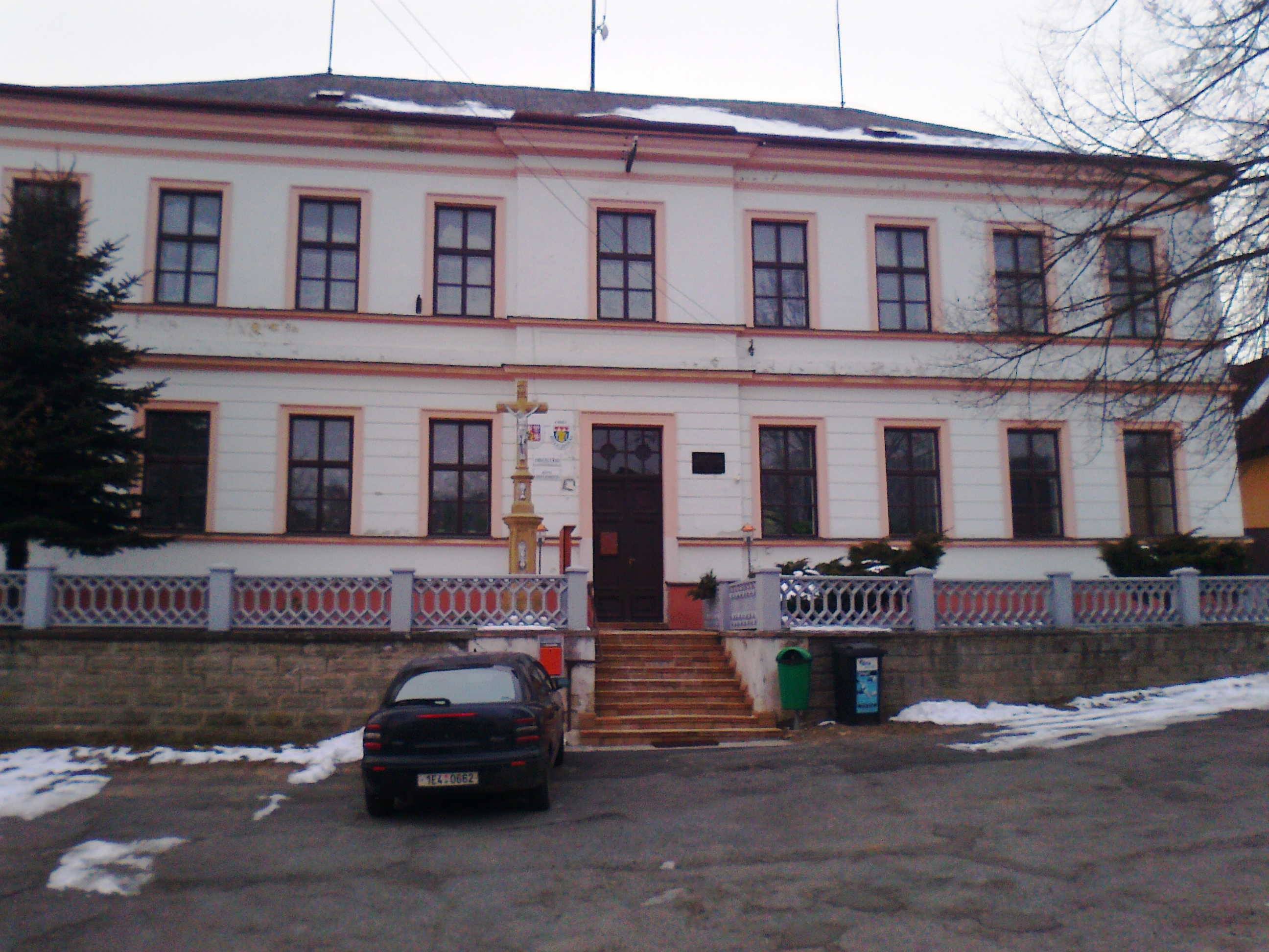 Obecní úřad, dříve základní škola